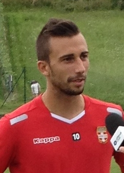 Nicolas Benezet interviewé par Canal+ lors de son passage à Evian en 2014